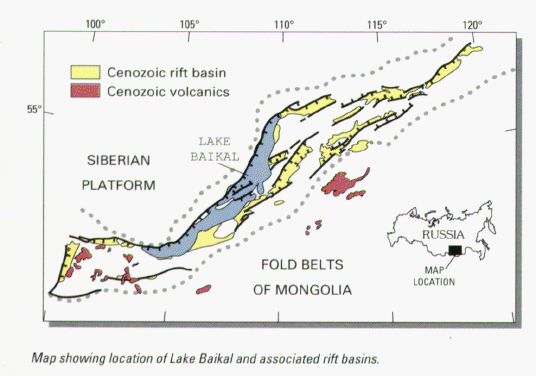 Map of Lake Baikal rift